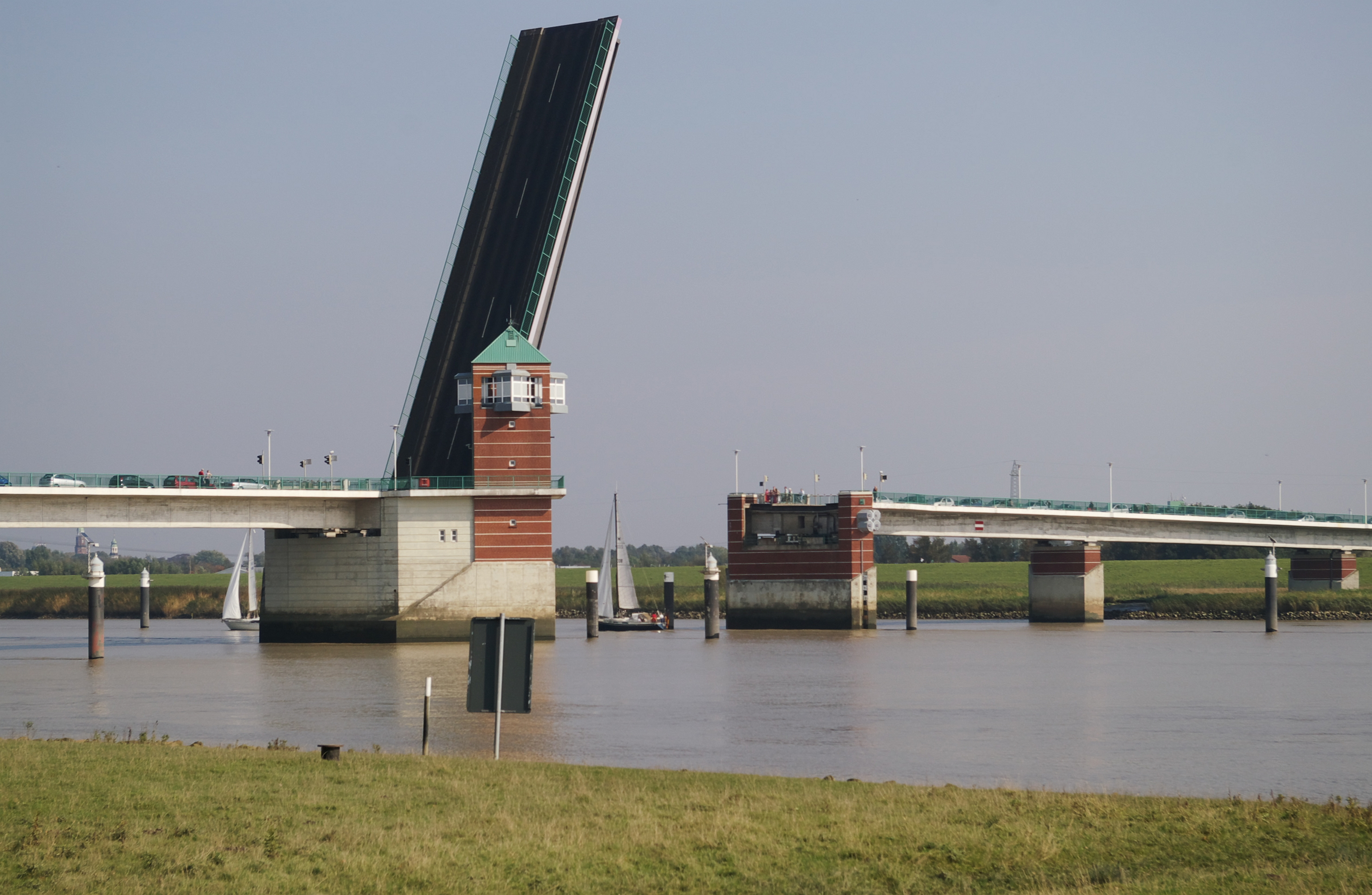 Jann-Berghaus-Brücke über die Ems bei Leer, Ostfriesland (Niedersachsen), Klappbrücke, B436